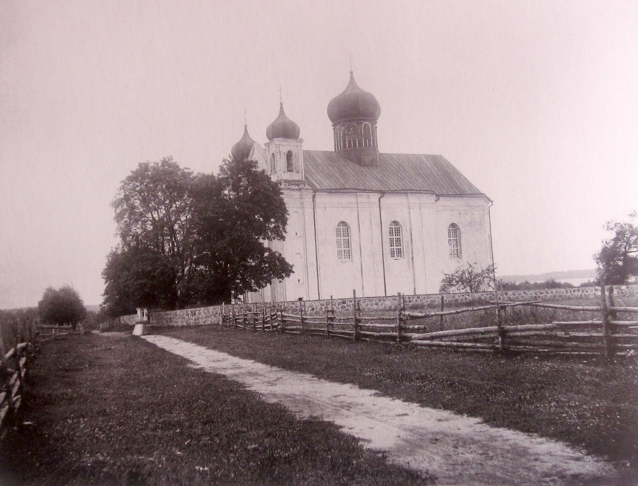 Беларуская (тарашкевіца): Быстрыца (Bystryca). Касьцёл Узвышэньня Сьвятога Крыжа па маскоўскай перабудове